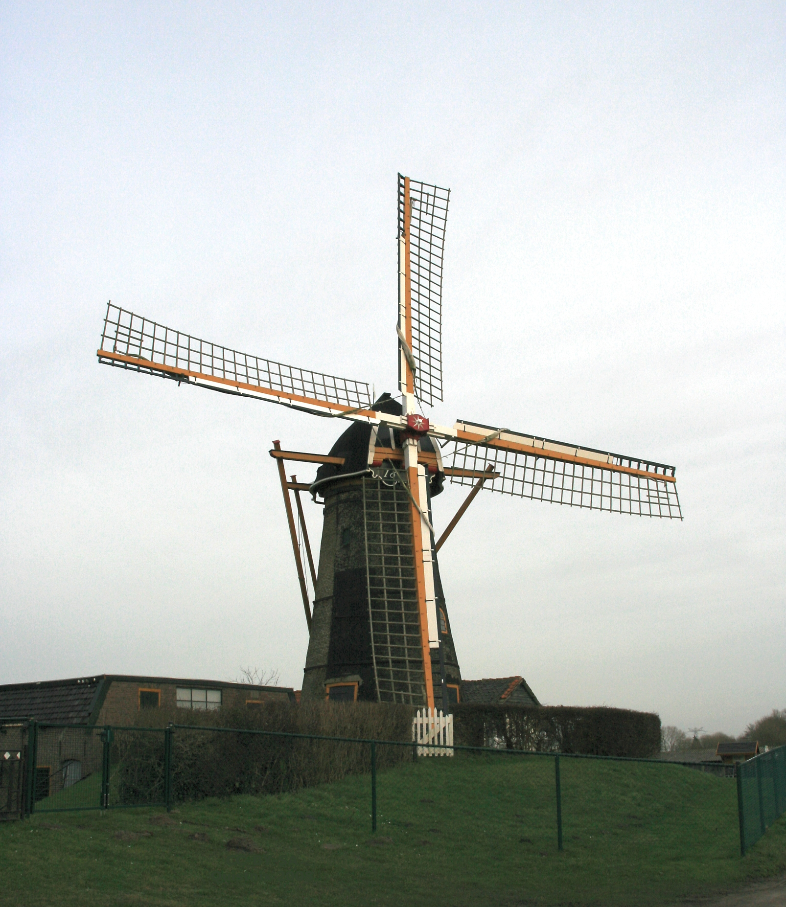 Oostvoorne: korenmolen. Molendijk 23, (gemeente Westvoorene) Rijksmonument nr: 38892 Ronde, bakstenen korenmolen (1821)